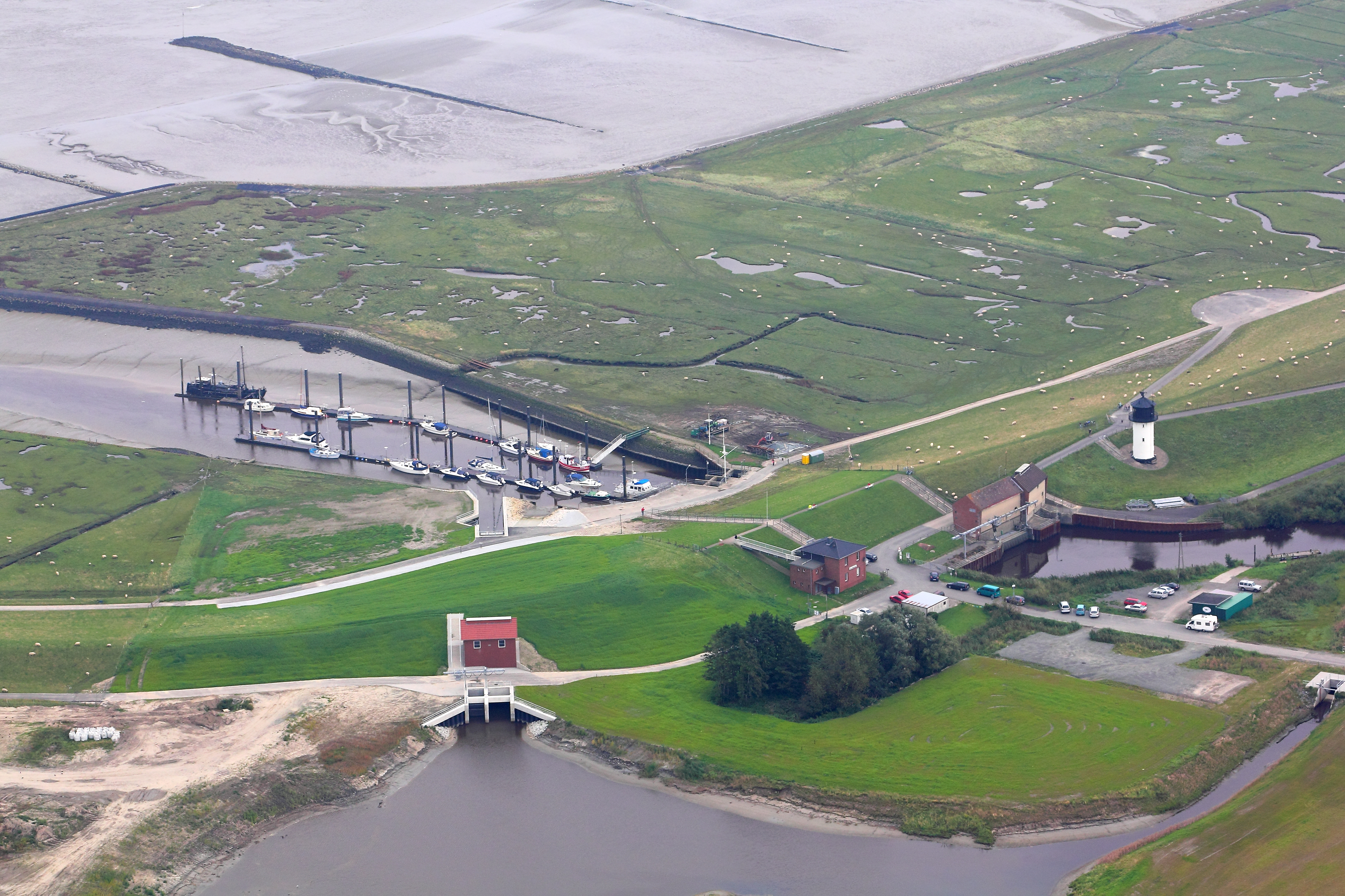 Altenbrucher Hafen Dieses Foto entstand aufgrund eines Projektes, das von Wikimedia Deutschland e. V. gefördert wurde. Im Rahmen des „Community-Projektbudgets“ sollen Luftbilder u.a. von Inseln, Halligen, Sanden und Küstenstädten der deutschen Nordseeküste angefertigt werden. Das Projekt „Fotoflüge“ wurde im September 2011 begonnen.